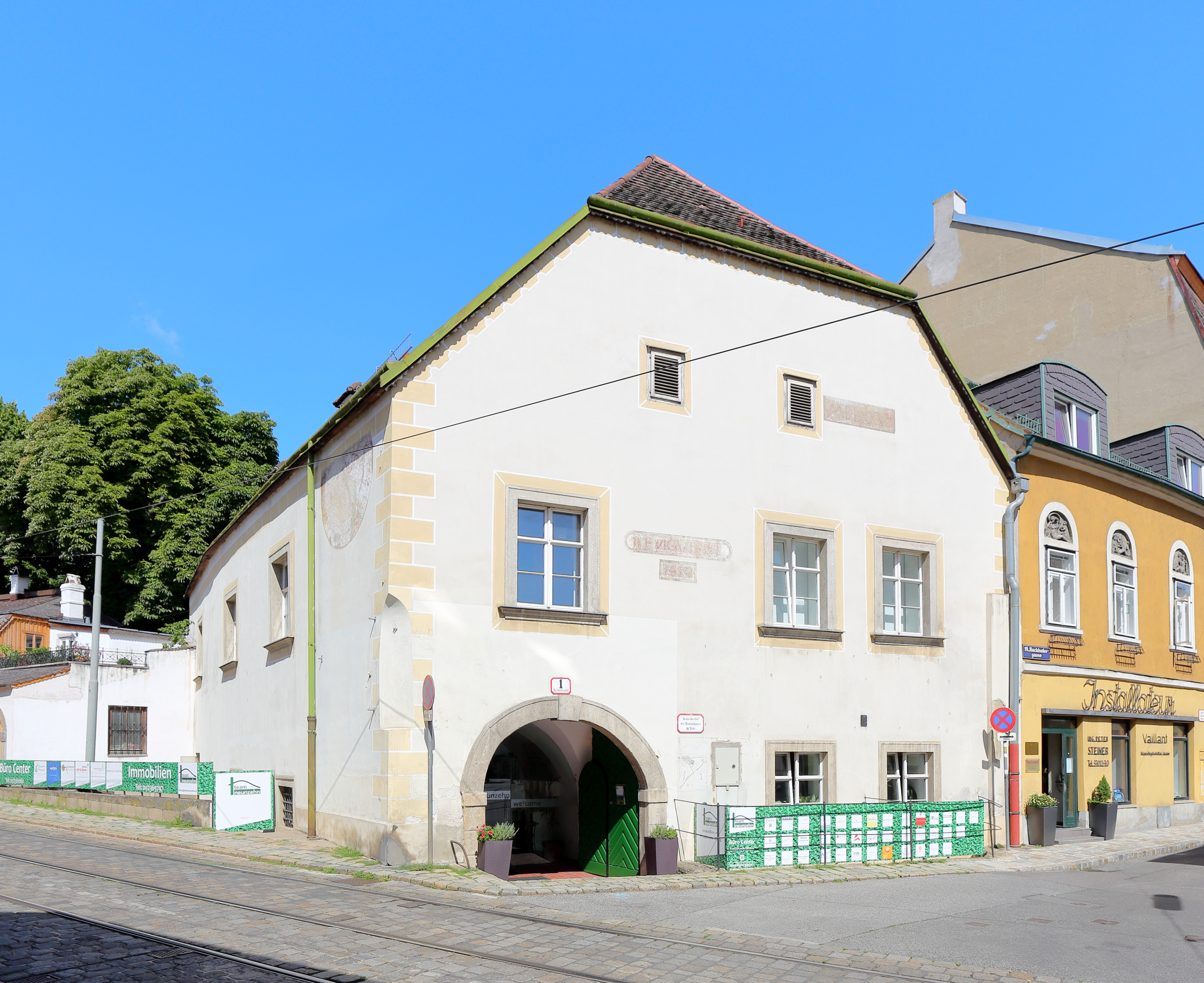 Der denkmalgeschützte Neudeckerhof bzw. Neudeggerhof in Nussdorf, ein Bezirksteil des 19. Wiener Gemeindebezirkes Döbling.Ein breitgelagerter, zweigeschossiger, giebelständiger Bau mit Schopfwalmdach, der 1577 errichtet wurde. Südseitig eine gemalte Sonnenuhr mit der Datierung 1577. An der Vorderfront die Renovierungsinschrift 1684.